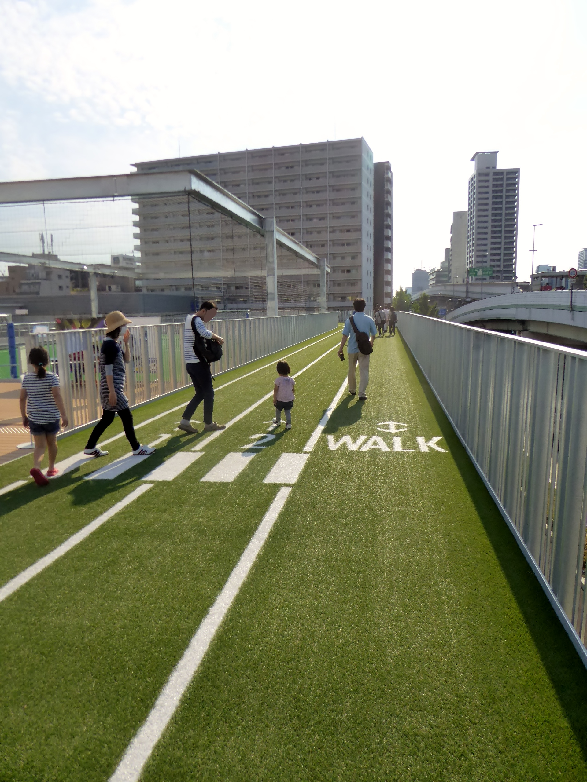 もりのみやキューズモールBASEを撮影。